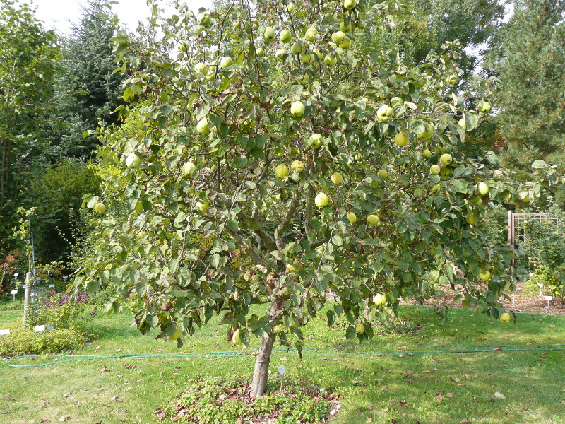 Cydonia oblonga cv. 'Vranja'